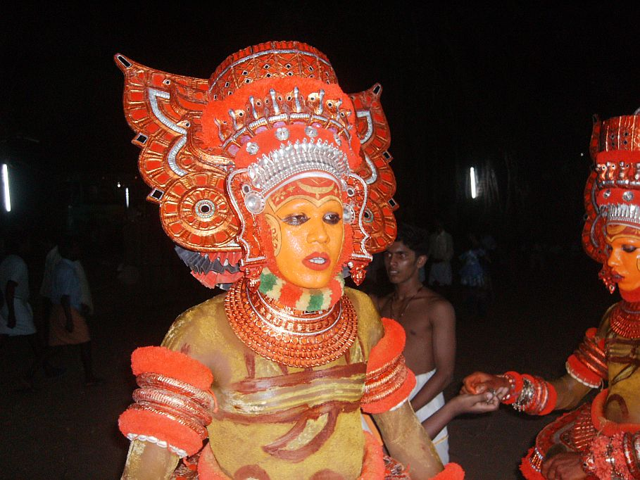 കണ്ണൂർ ജില്ലയിലെ കണ്ണപുരം പഞ്ചായത്തിലെ കീഴറ കൂലോം ഭഗവതി ക്ഷേത്രത്തിൽ കെട്ടിയാടിയ ദൈവച്ചേകോൻ തെയ്യത്തിന്റെ വെള്ളാട്ടം